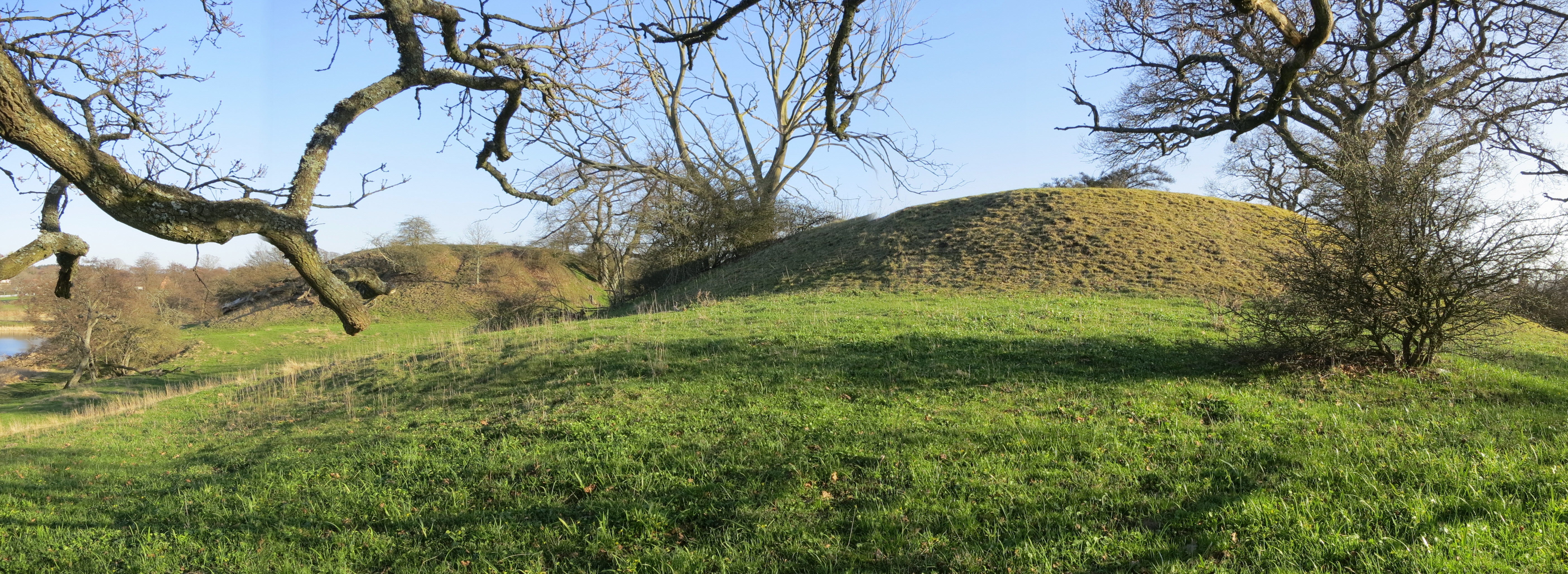 Turestorpsö, borgruin vid Havgårdssjön i Skåne